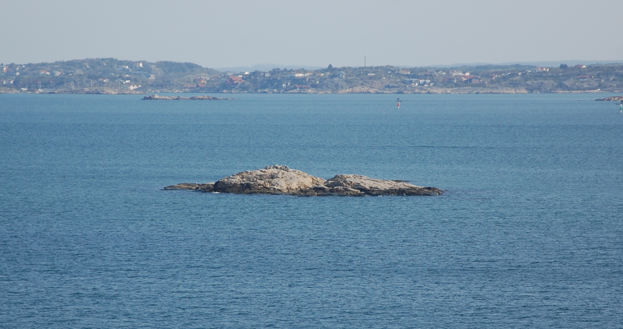 Insel im Schärengarten vor Göteborg